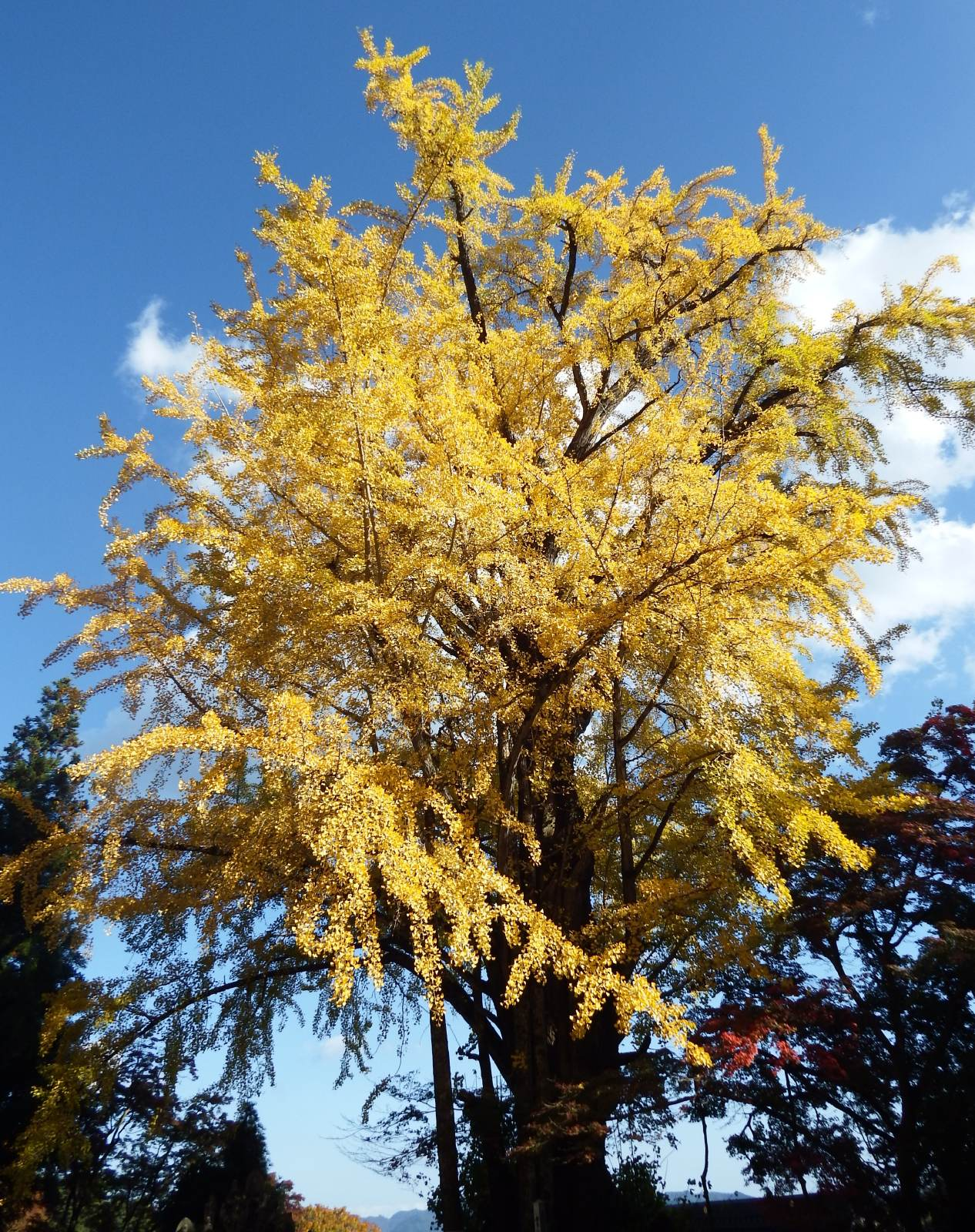 大窪寺の大イチョウ